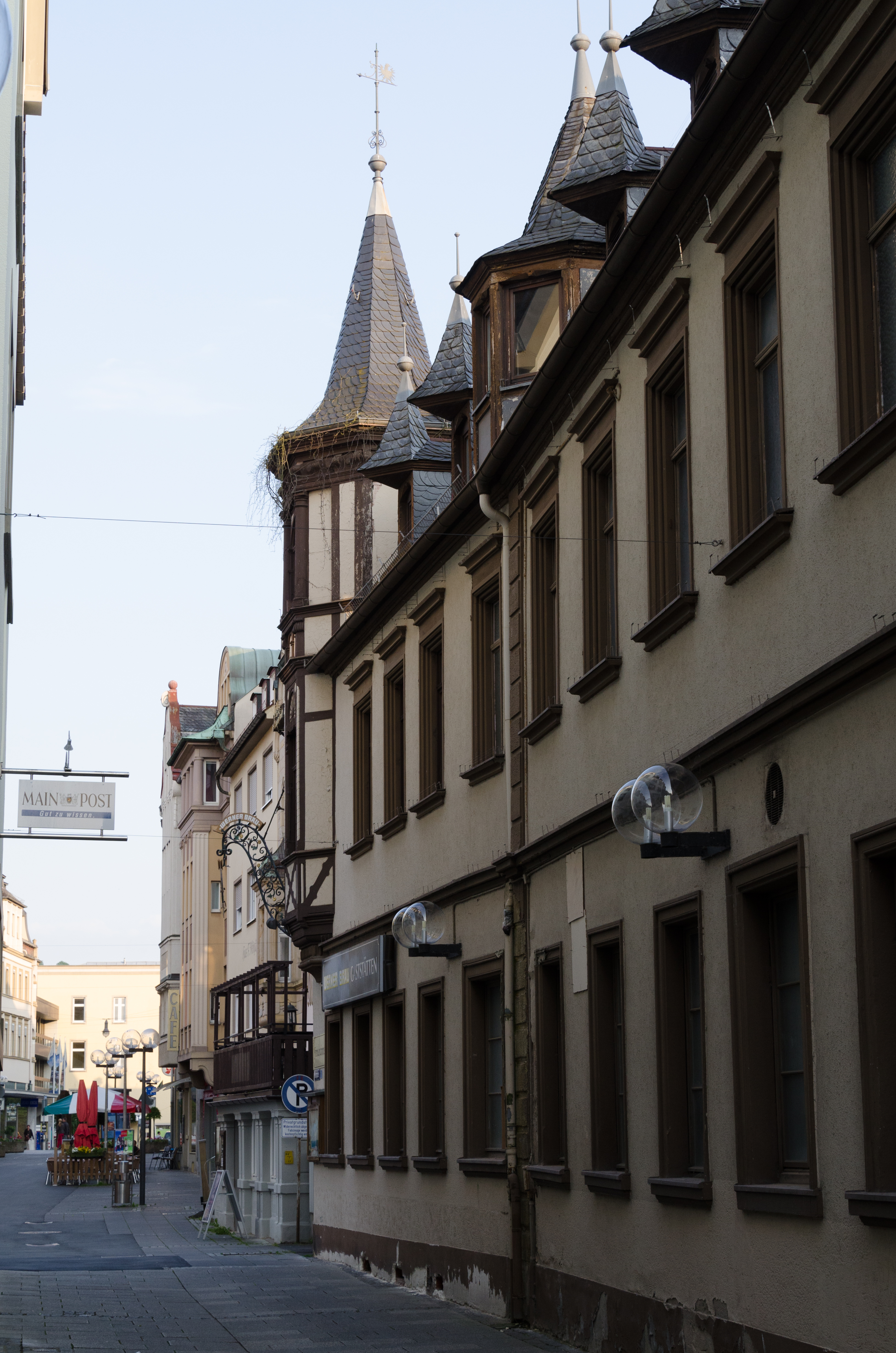 Bad Kissingen, Weidgasse 1